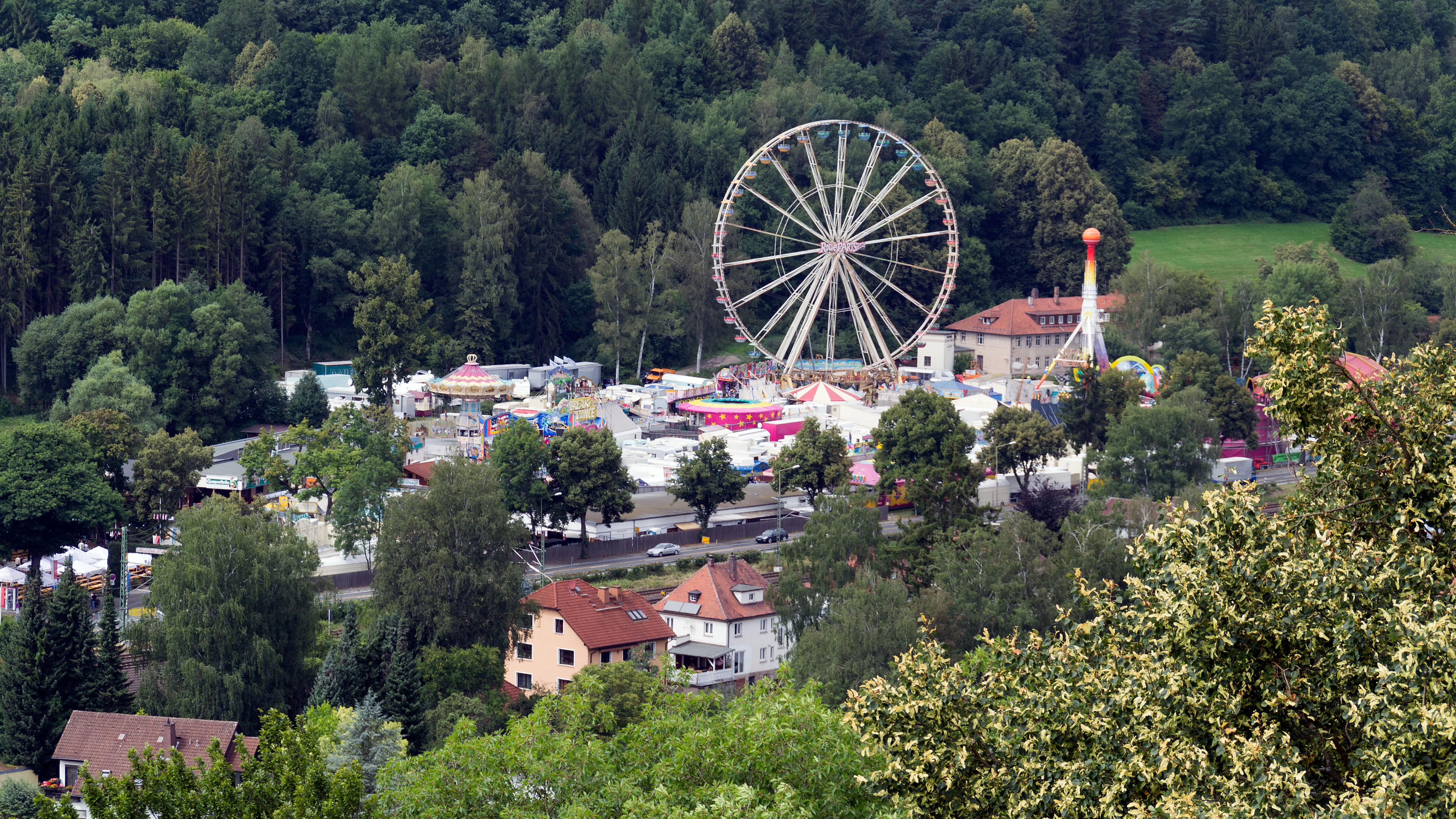 Festplatz des Kronacher Freischießens 2012 von der Festung Rosenberg aus gesehen.